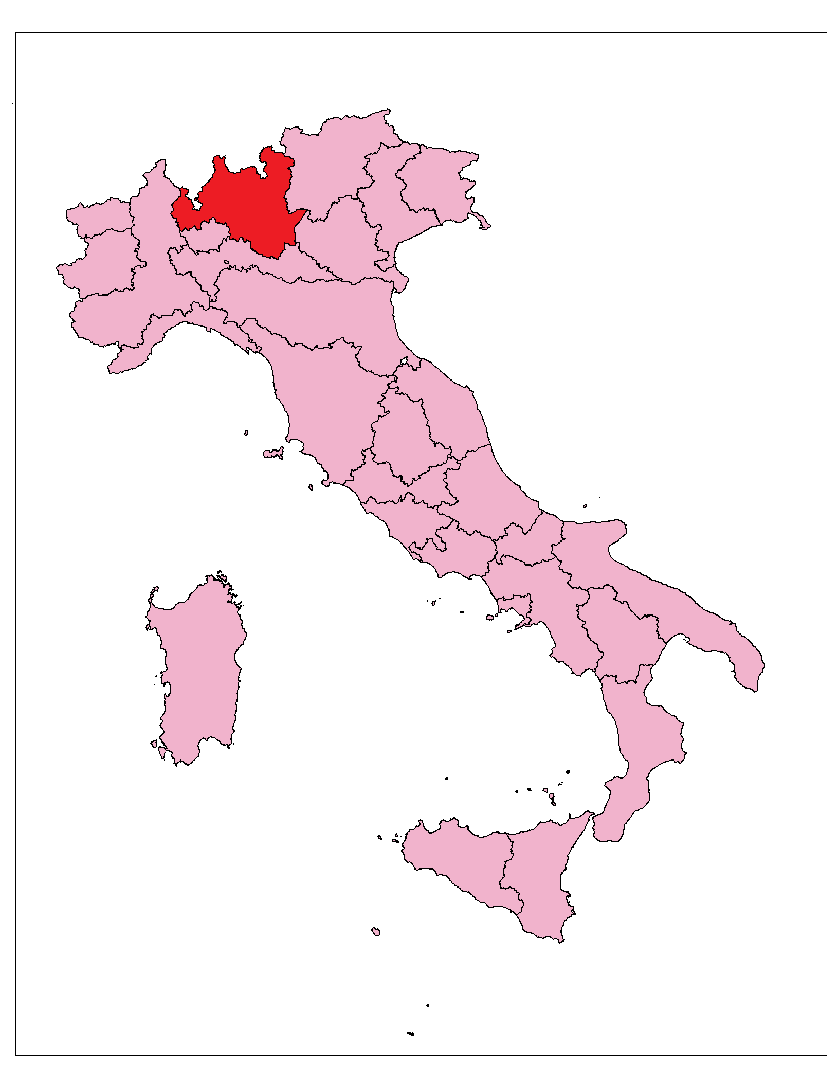 Mappa della Circoscrizione Lombardia 2 in vigore per la Camera dei Deputati.